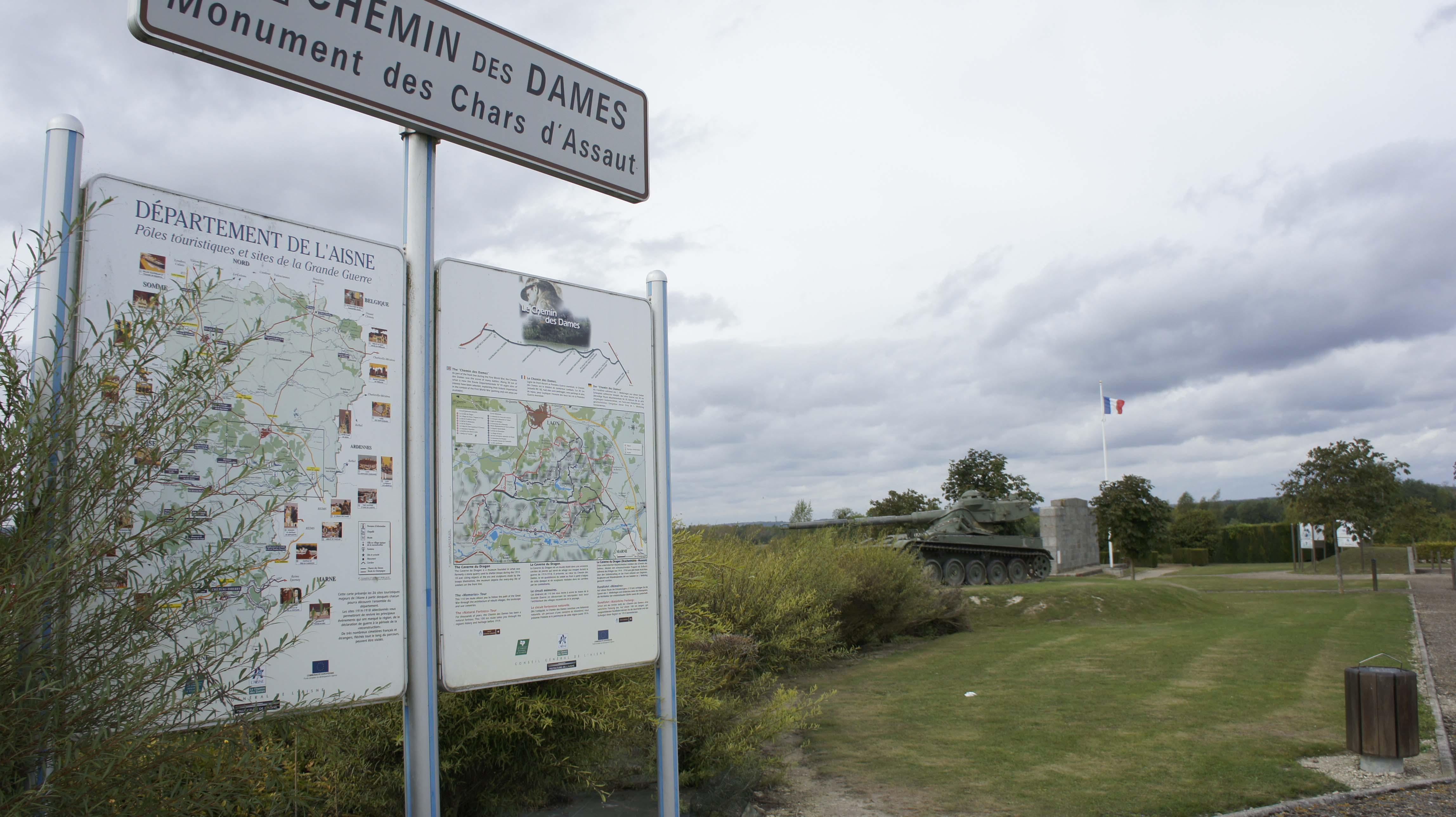 Monument aux chars d'assault partant de la ferme du Choléra et du général Estienne à Berry au Bac.